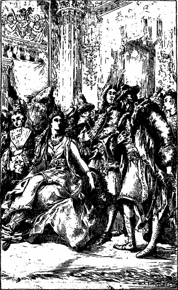 Lady Roxana